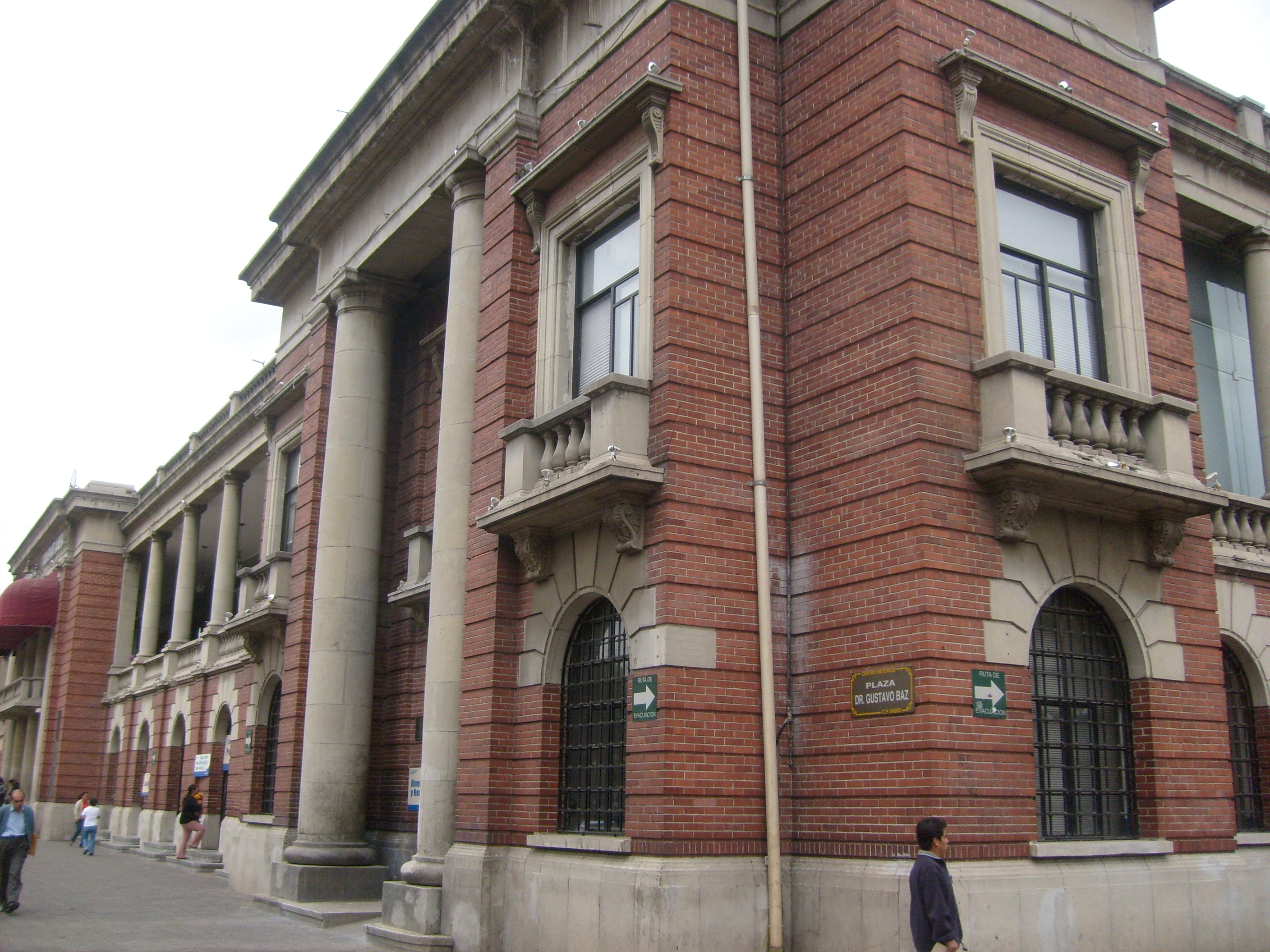 palacio de gobierno de tlalne